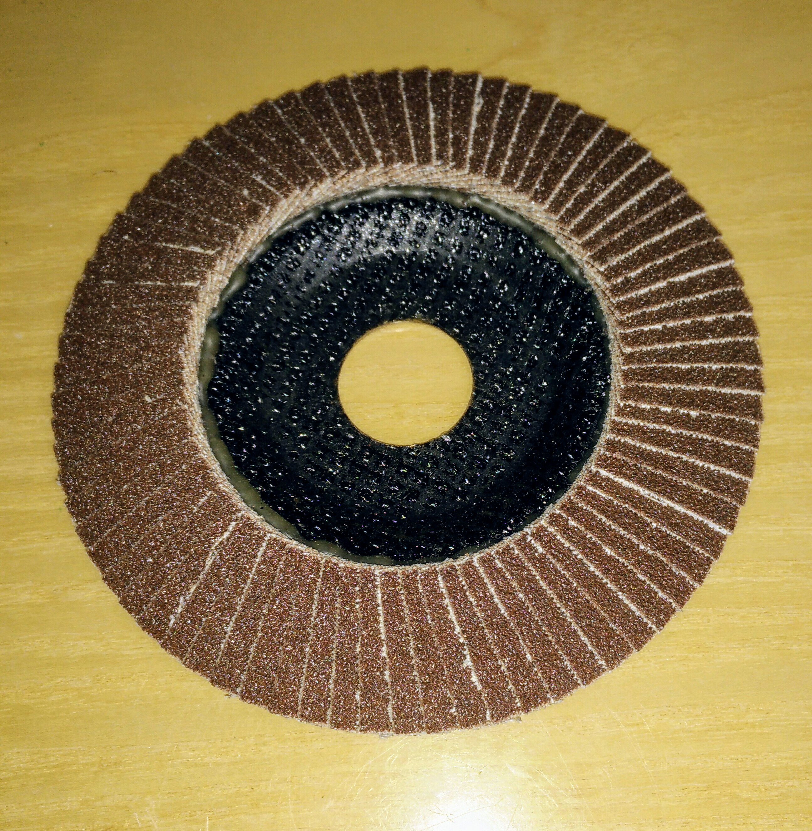 Neue Faecherschleifscheibe für einen Winkelschleifer